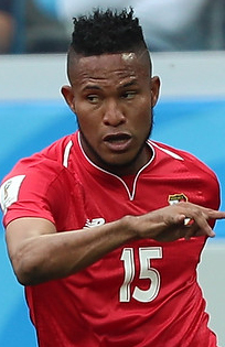 Сборная Англии сокрушила Панаму, Кейн оформил хет-трик